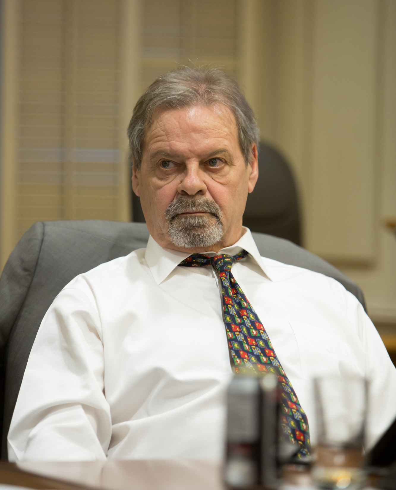 André Spénard, député de Beauce-Nord